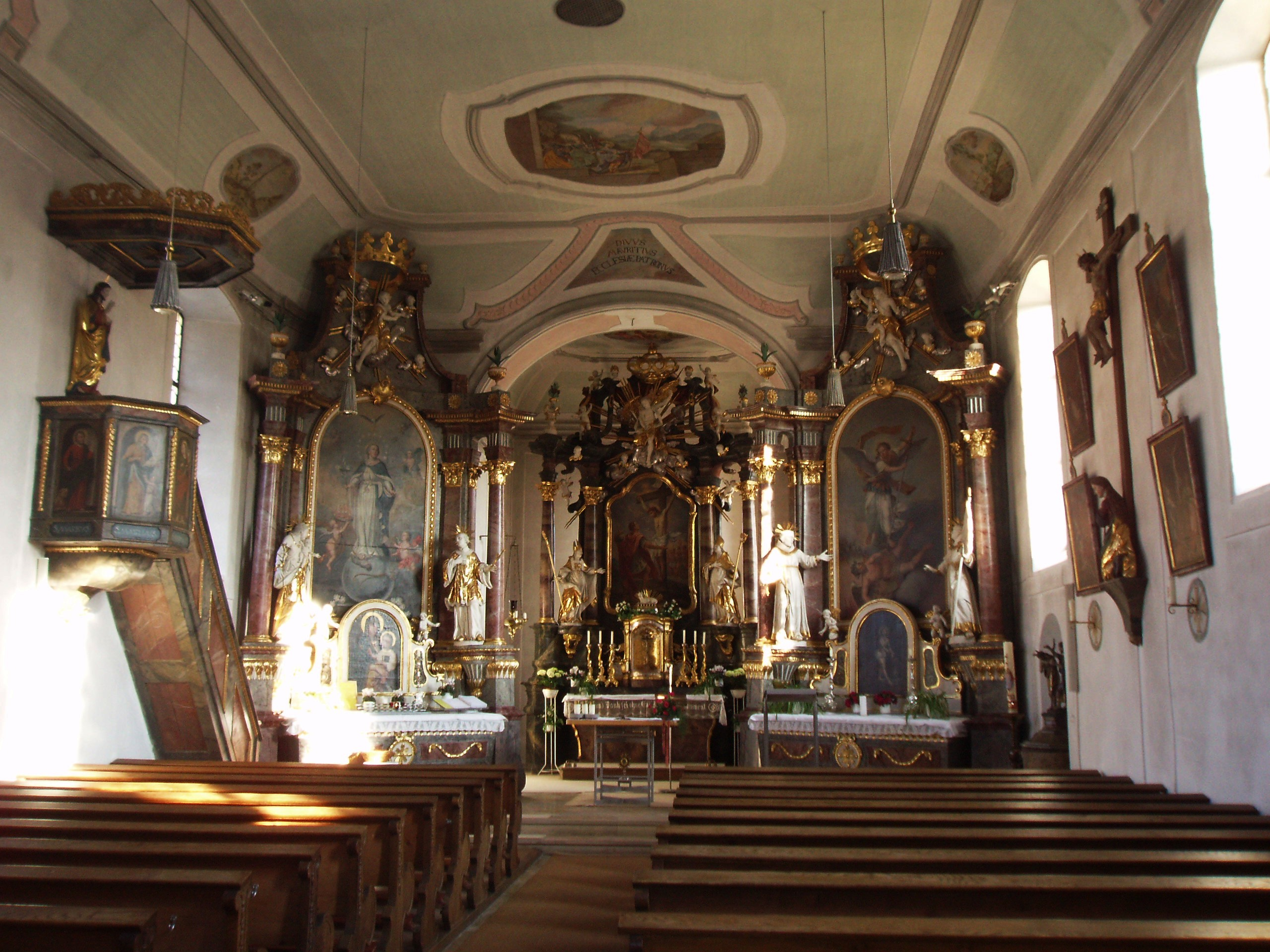 Bergheim, Landkreis Neuburg-Schrobenhausen, Kirche St. Mauritius, Kircheninneres gegen Osten